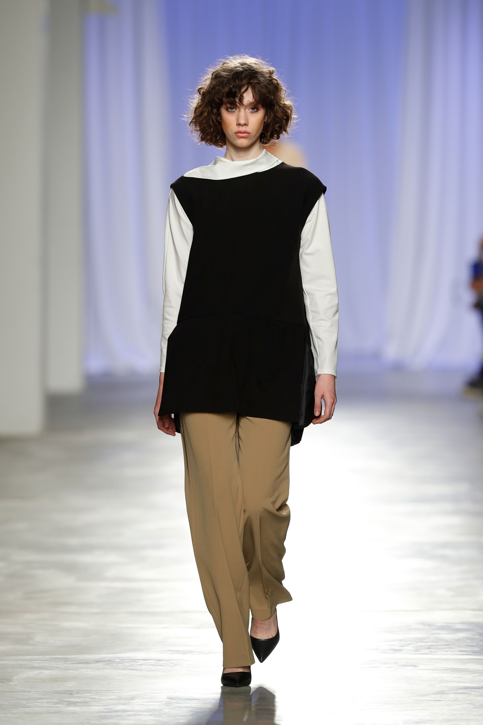 Ricardo Preto Fall/ Winter 2017